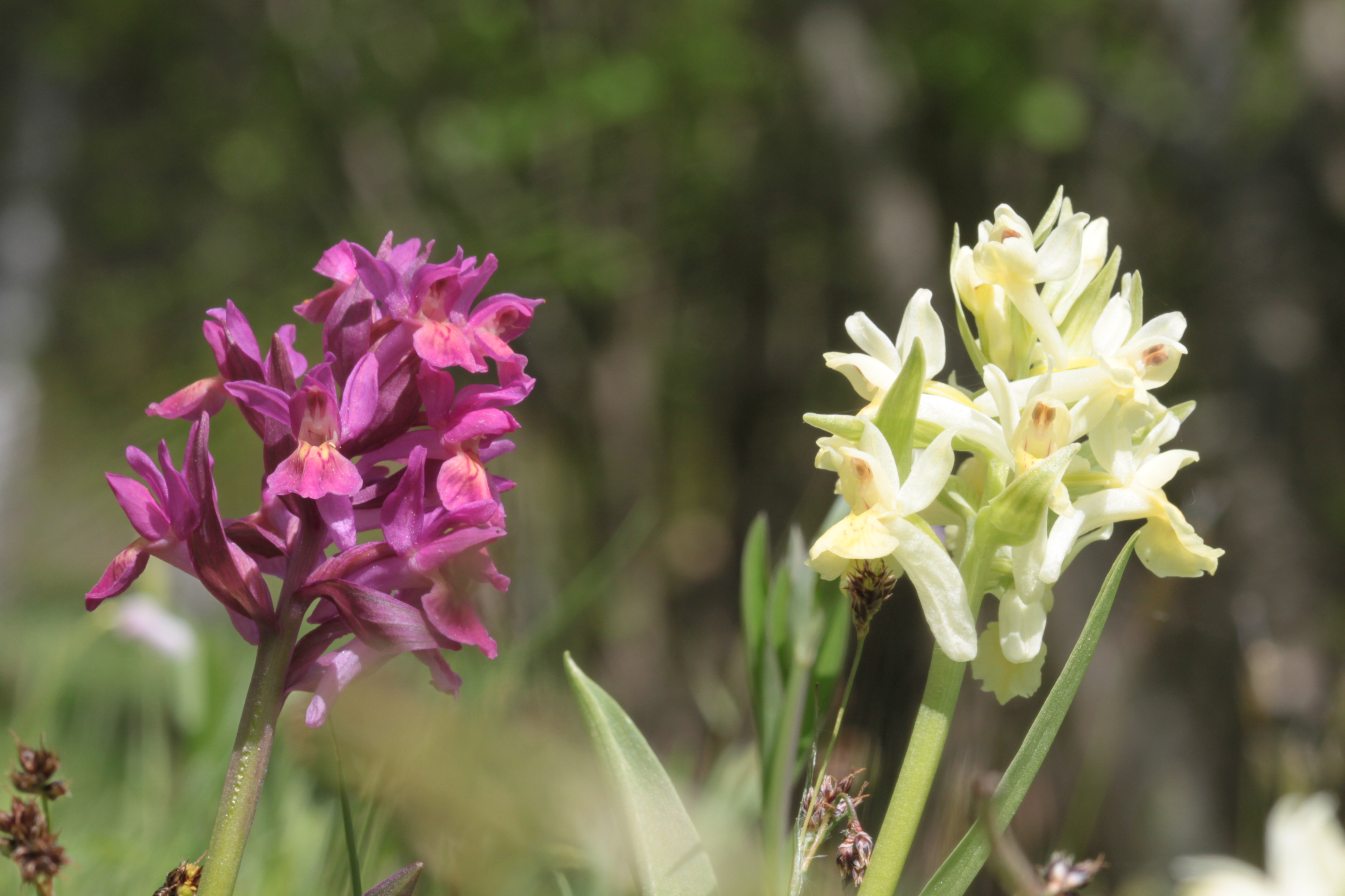 Orkidéerna Adam och Eva (Dactylorhiza latifolia / Dactylorhiza sambucina) i Öbacken-Bränninge naturreservat. 14 maj 2011.